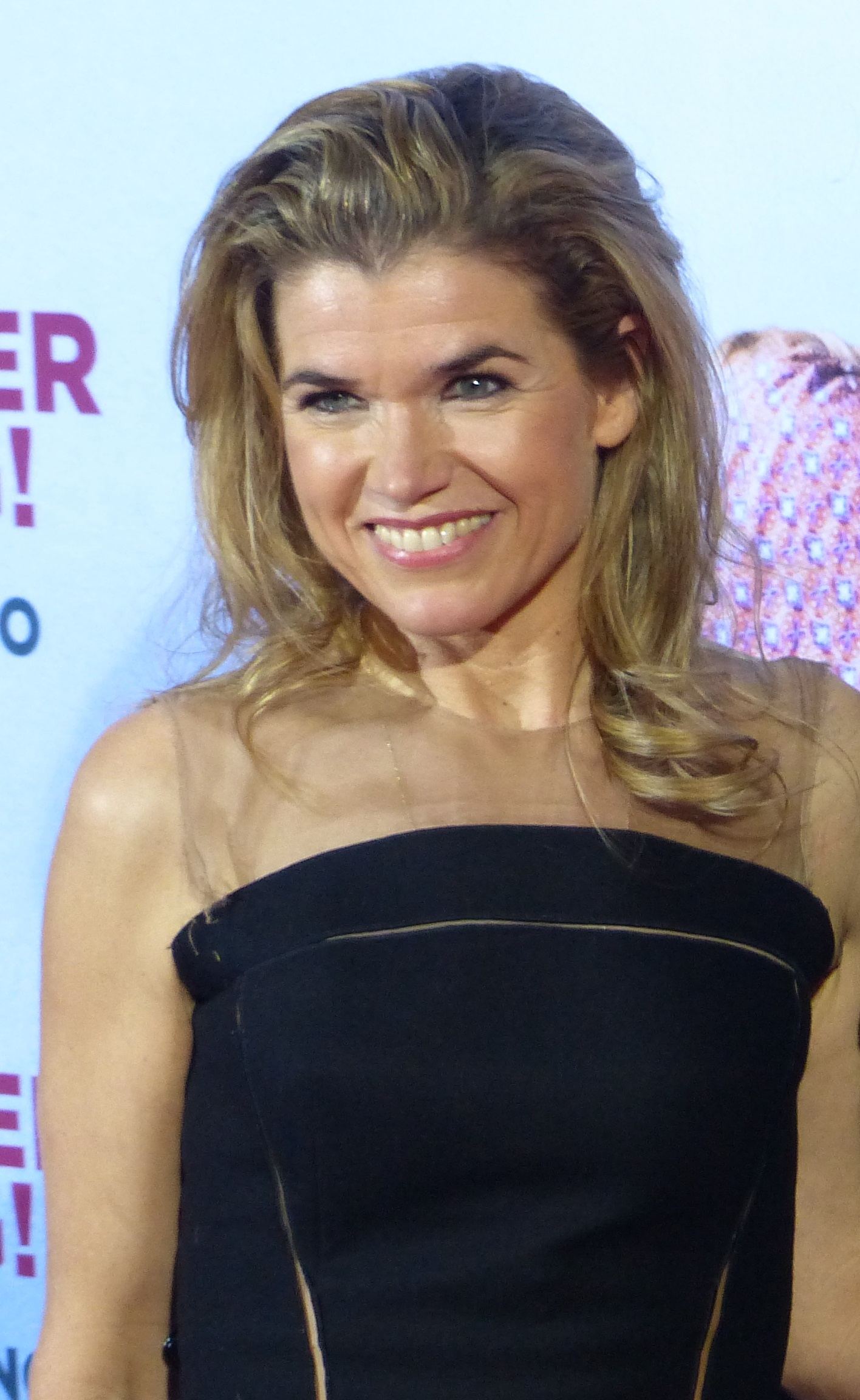 Anke Engelke bei der Kinopremiere von "Frau Müller muss weg", Januar 2015, Cinedom Köln